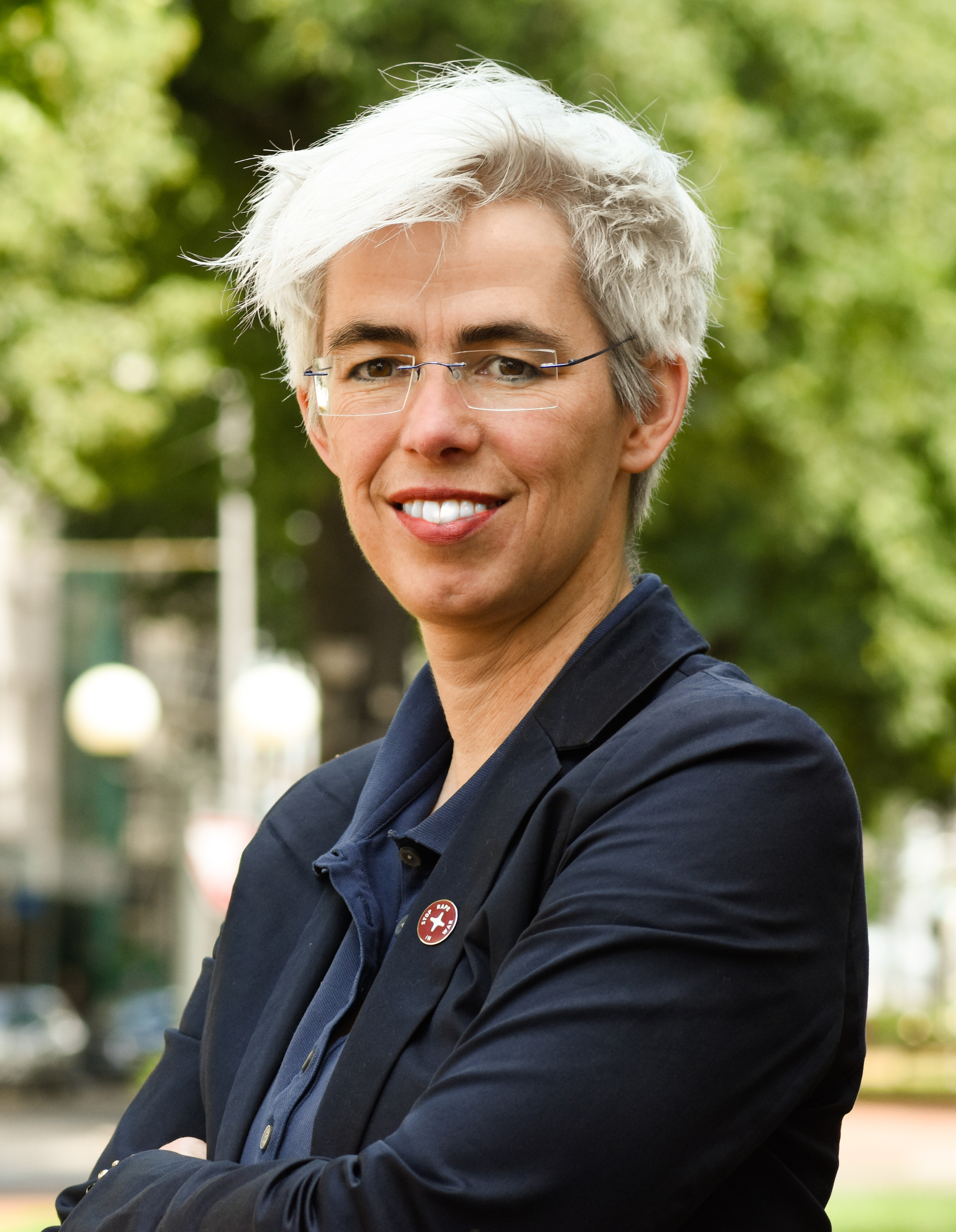 Ein aktuelles Porträt von Ulle Schauws in Krefeld aus dem Jahr 2017.